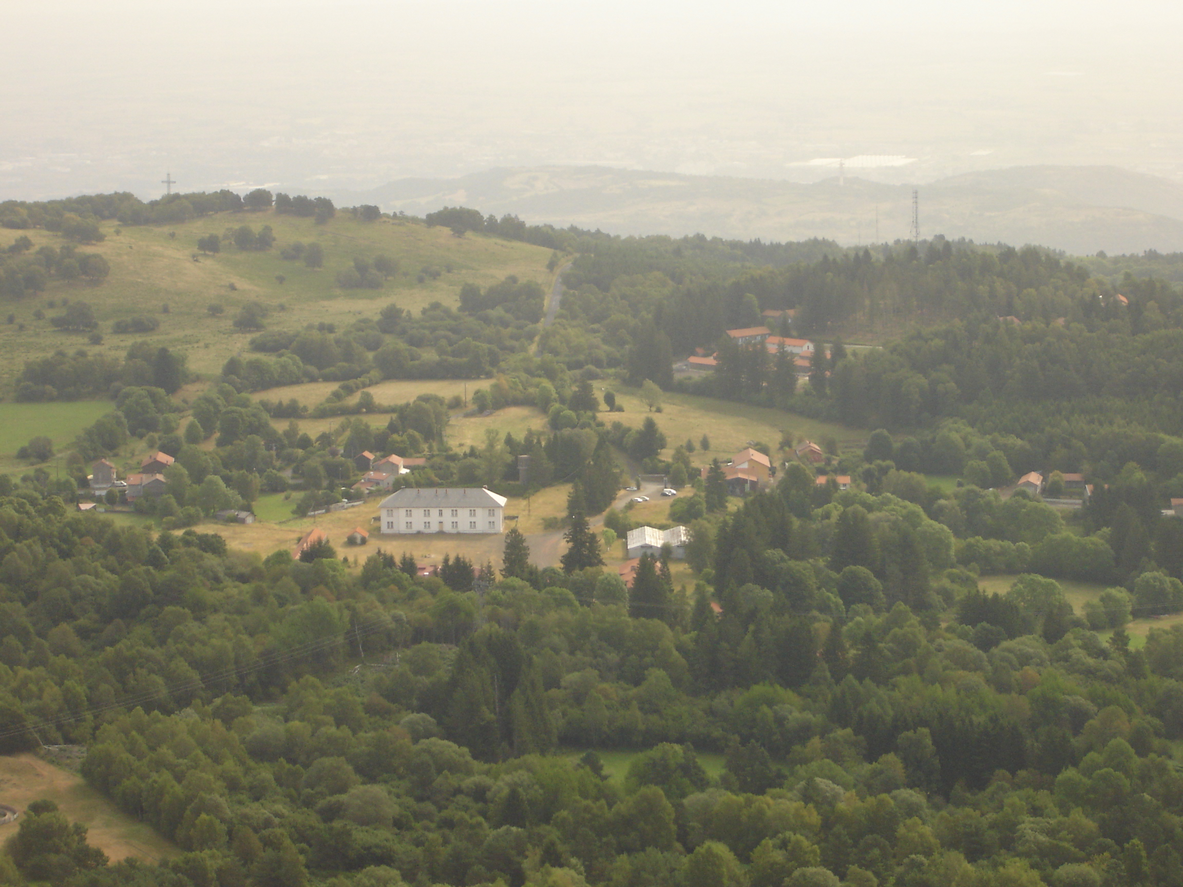 Vue du lieu-dit La Fontaine du Berger (Commune d'Orcines) avec l'ancien camp militaire. Vue prise depuis le Pariou.